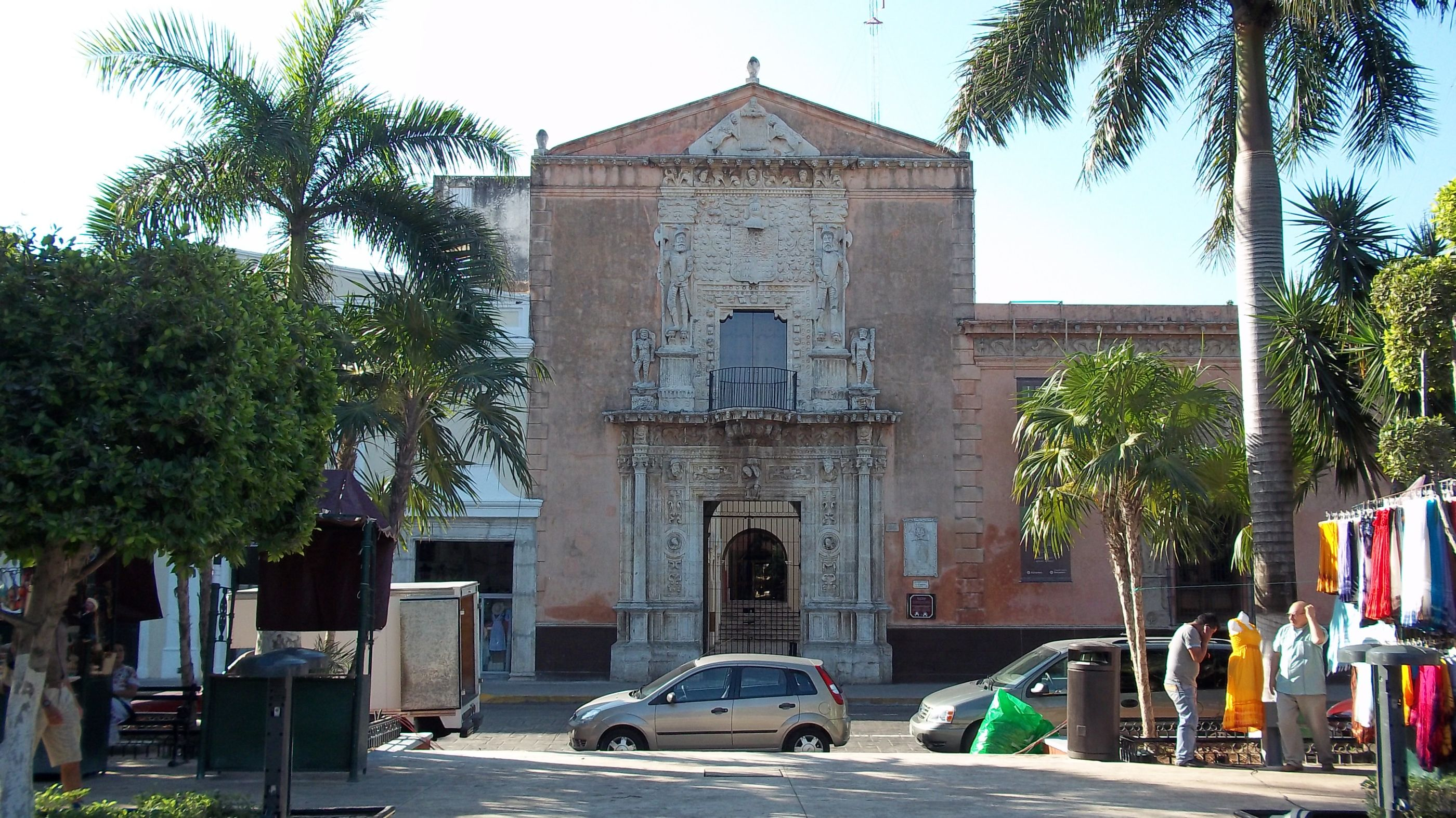 Casa de Montejo junto al parque principal; Mérida, Yucatán, México.